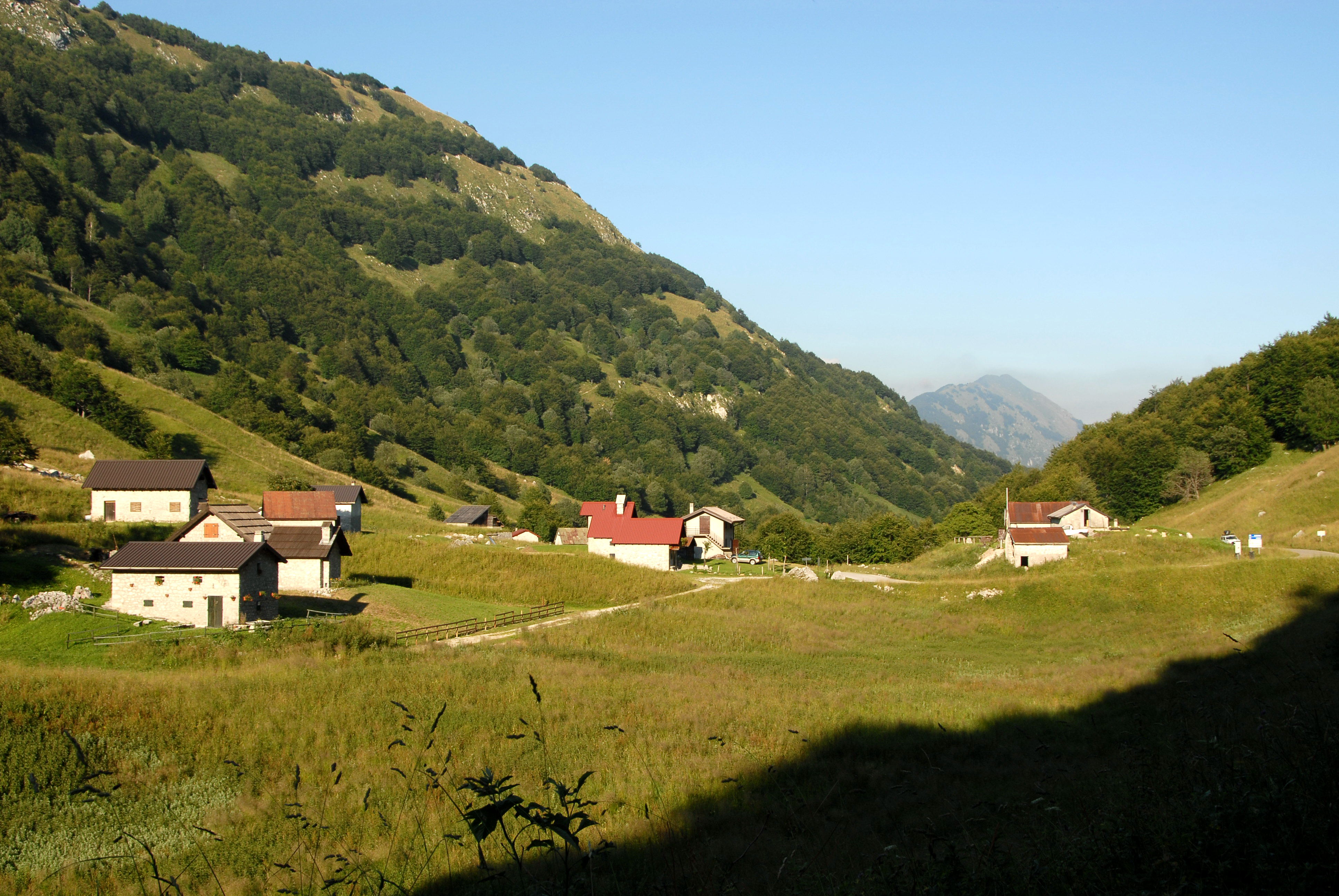 Sella Carnizza in the community Resia, Friuli-Giulia Venezia, Italy